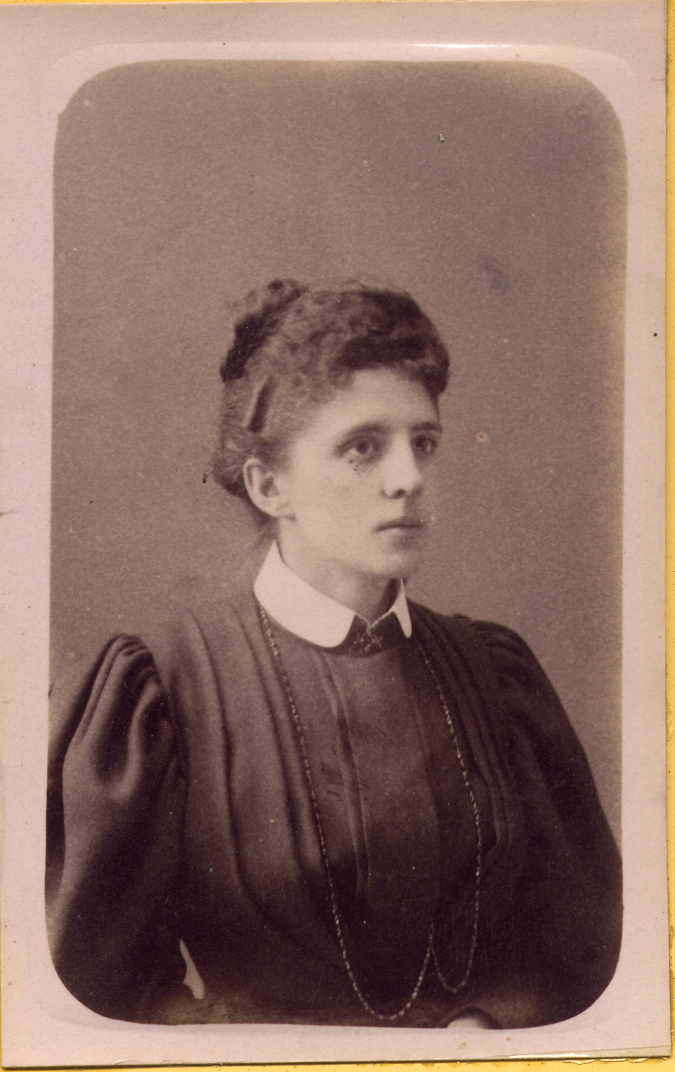 Photo d'Isabelle Straatman, épouse du sinologue belge Charles Michel.